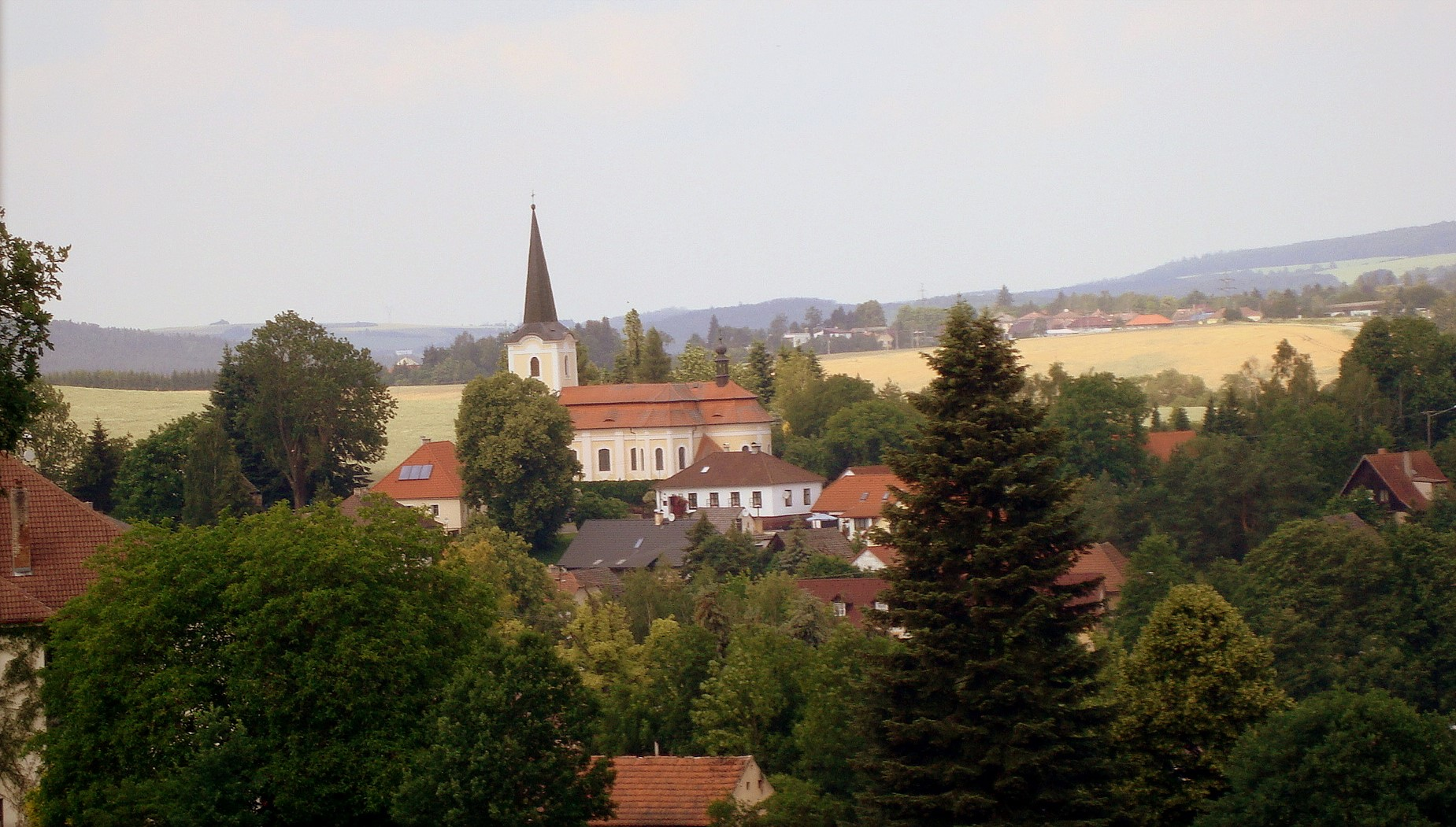 Mileč